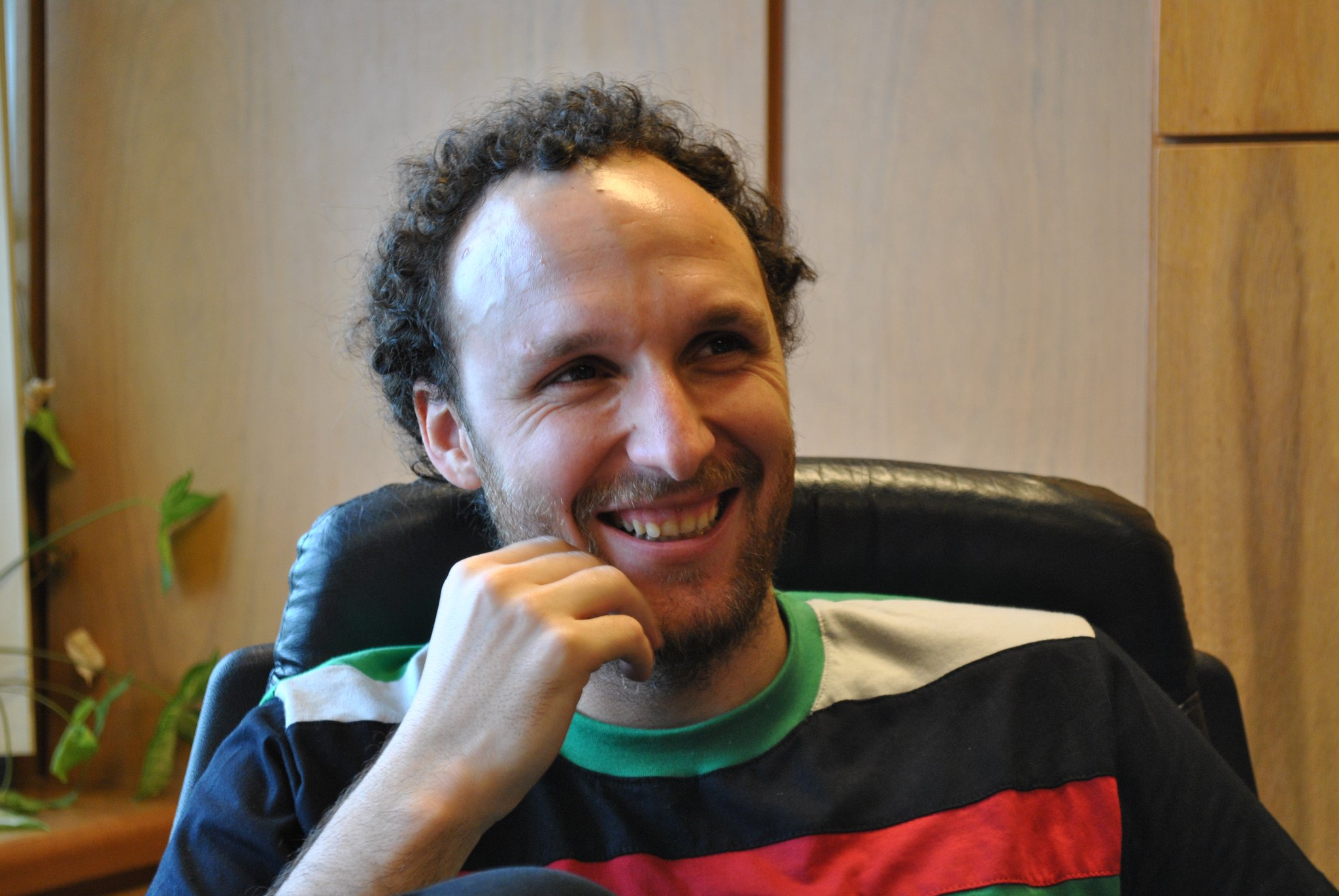 Foto del diputado Sebastián Sabini en su despacho